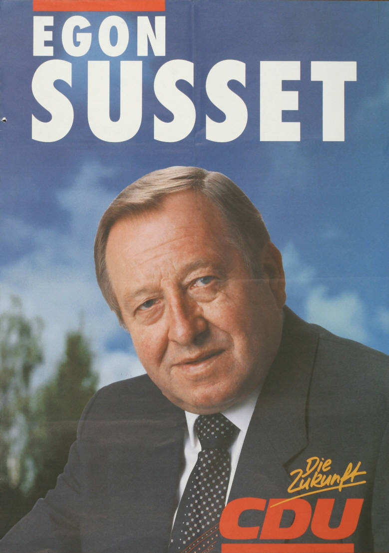 Egon Susset Die Zukunft CDU Abbildung: Porträtfoto Plakatart: Kandidaten-/Personenplakat mit Porträt Objekt-Signatur: 10-001: 2939 Bestand: Plakate zu Bundestagswahlen (10-001) GliederungBestand10-18: Plakate zu Bundestagswahlen (10-001) » Die 11. Bundestagswahl am 25. Januar 1987 » CDU » Mit Porträtfoto Lizenz: KAS/ACDP 10-001: 2939 CC-BY-SA 3.0 DE